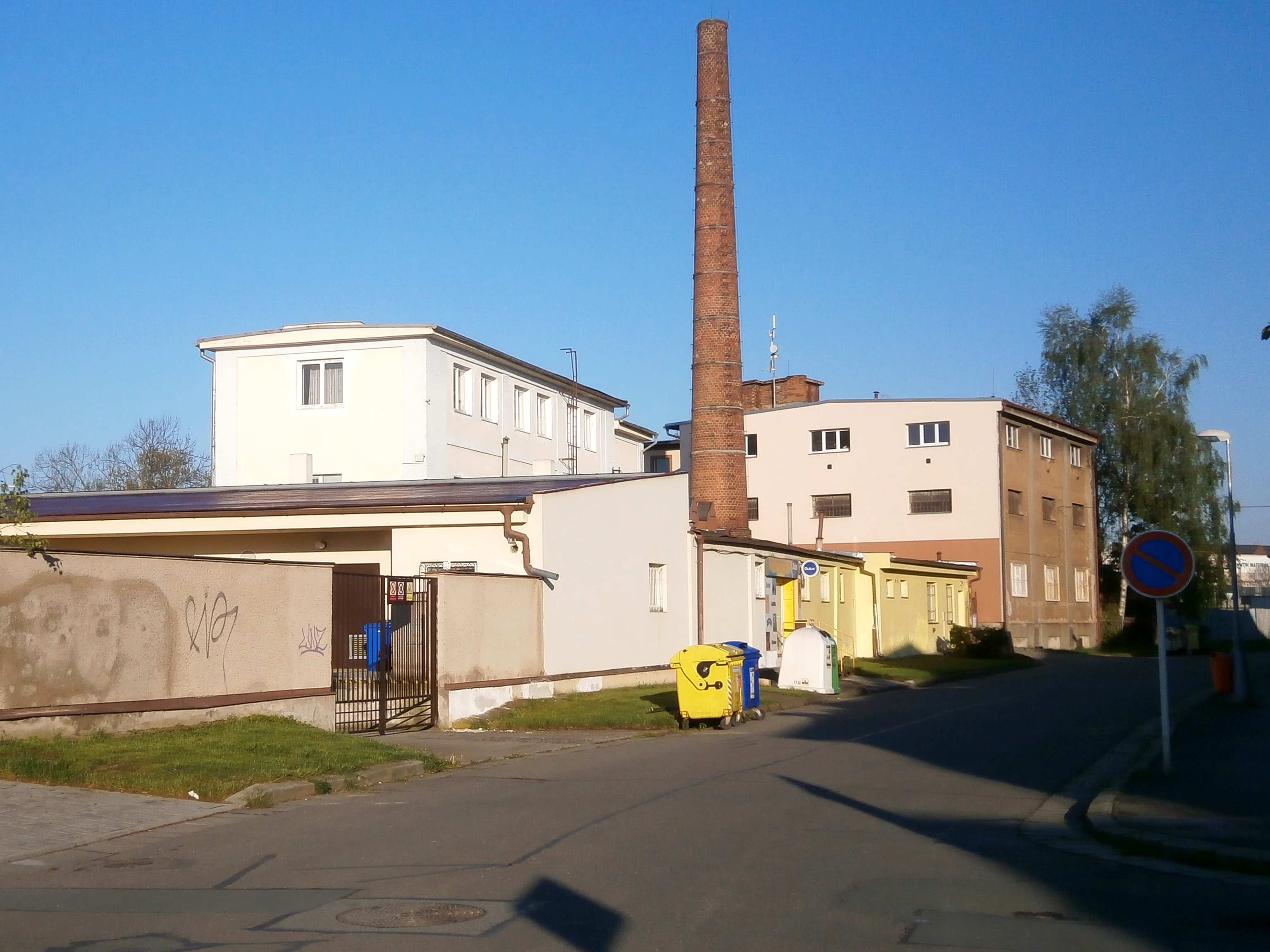 Velkopekárna Ústředního konsumního družstva (Na Okrouhlíku čp. 1630)